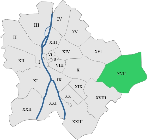 map hungary budapest district 17